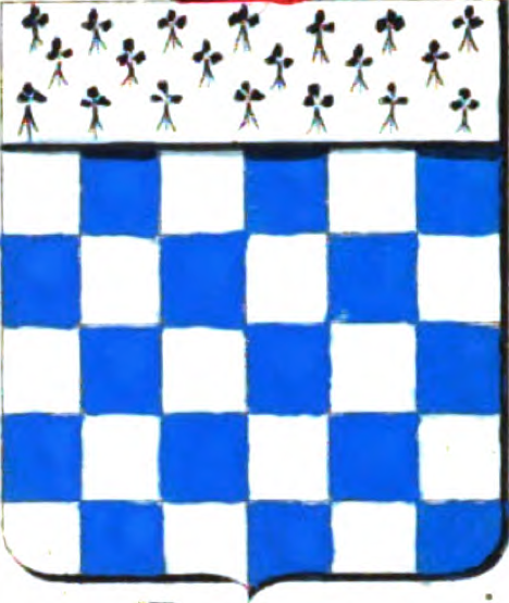 Échiqueté d'argent et d'azur de cinq tires, au chef d'argent, chargé de treize mouchetures d'hermine, rangées sept et six.